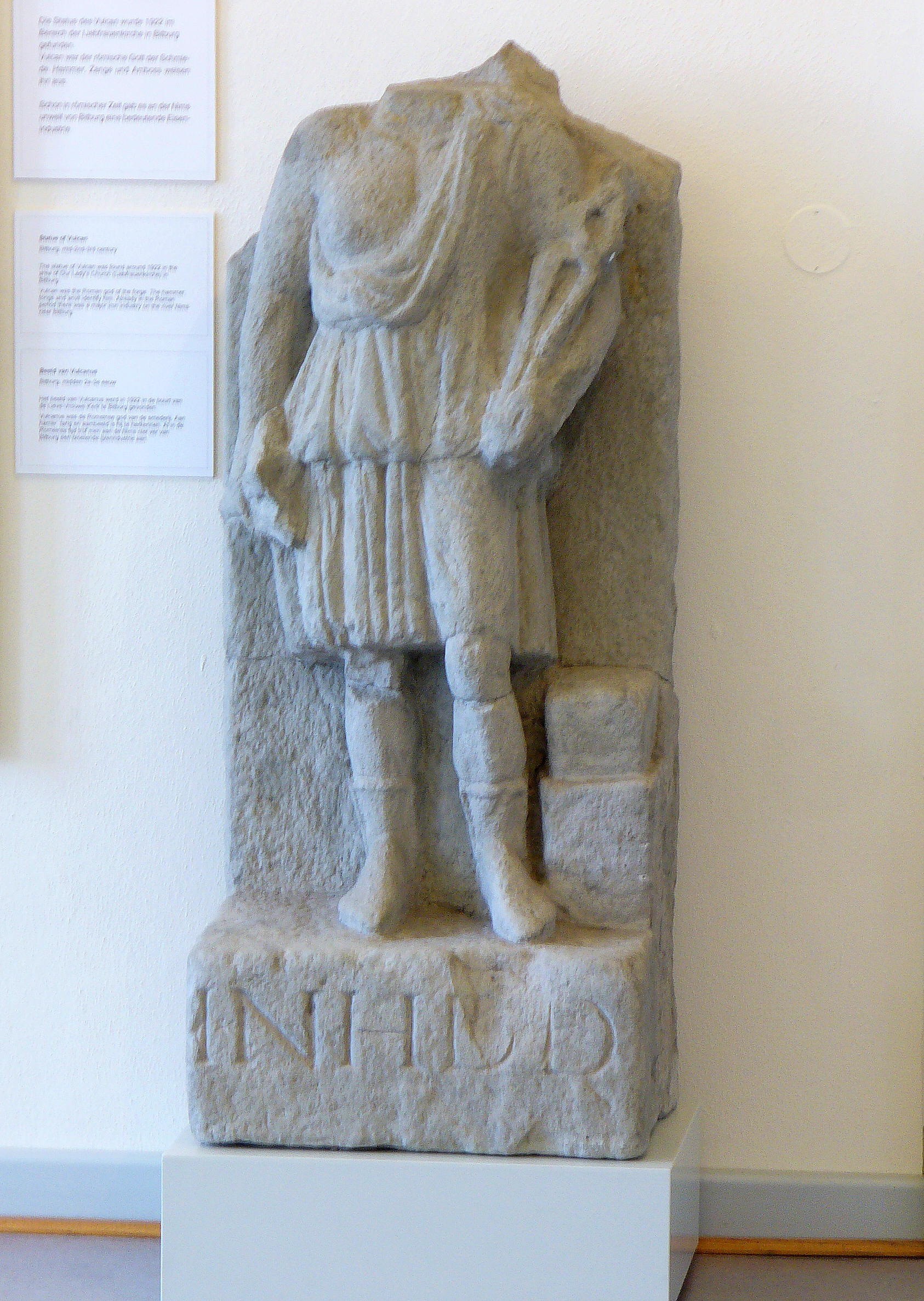 Relief de Vulcain à Bitburg (Beda). Finke 00073 = CSIR-D-04-03, 00363: In h(onorem) d(omus) d(ivinae). Dans le Kreismuseum Bitburg-Prüm.